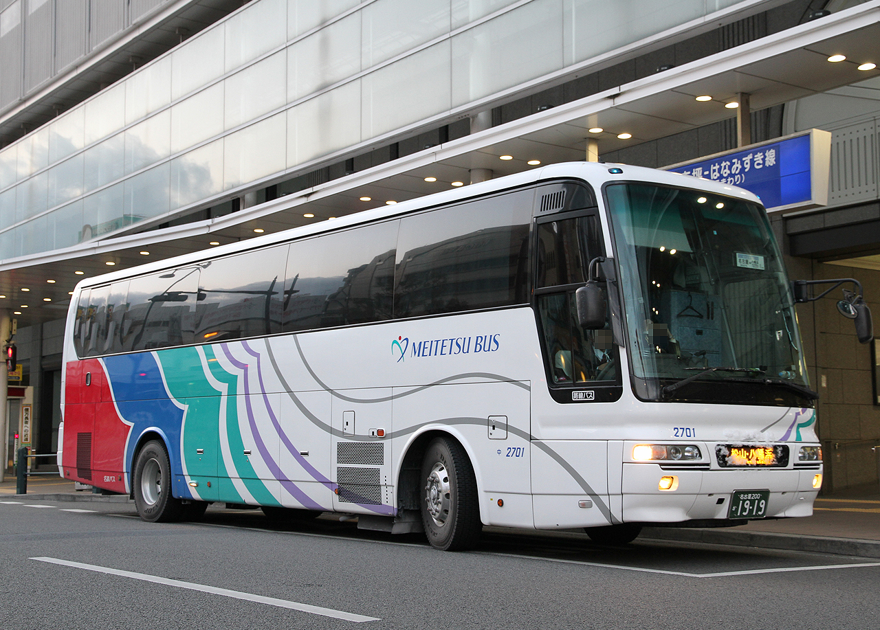 登録番号 名古屋200か19-19 名鉄バス㈱名古屋中央営業所所属 車番2701 夜行用車両 2012年2月18日 伊予鉄松山市駅前にて撮影 撮影者 Zondag2000